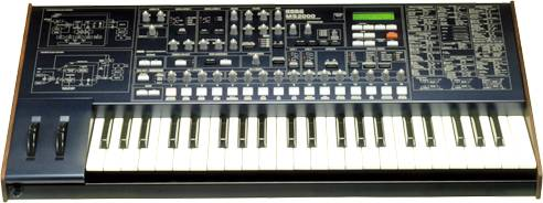 Korg MS2000 My keys